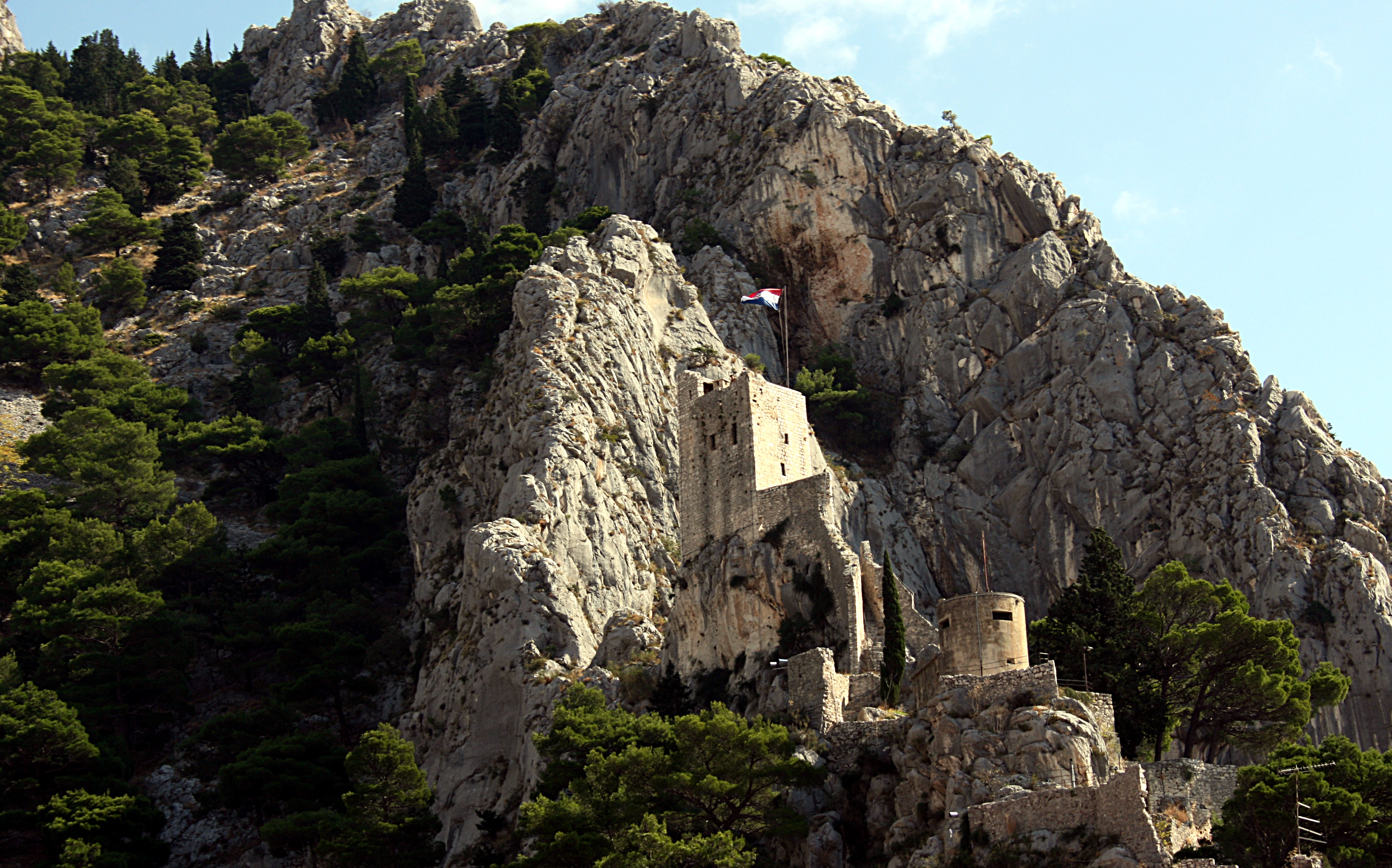 Am linken Ufer der Cetina, kurz vor Omis